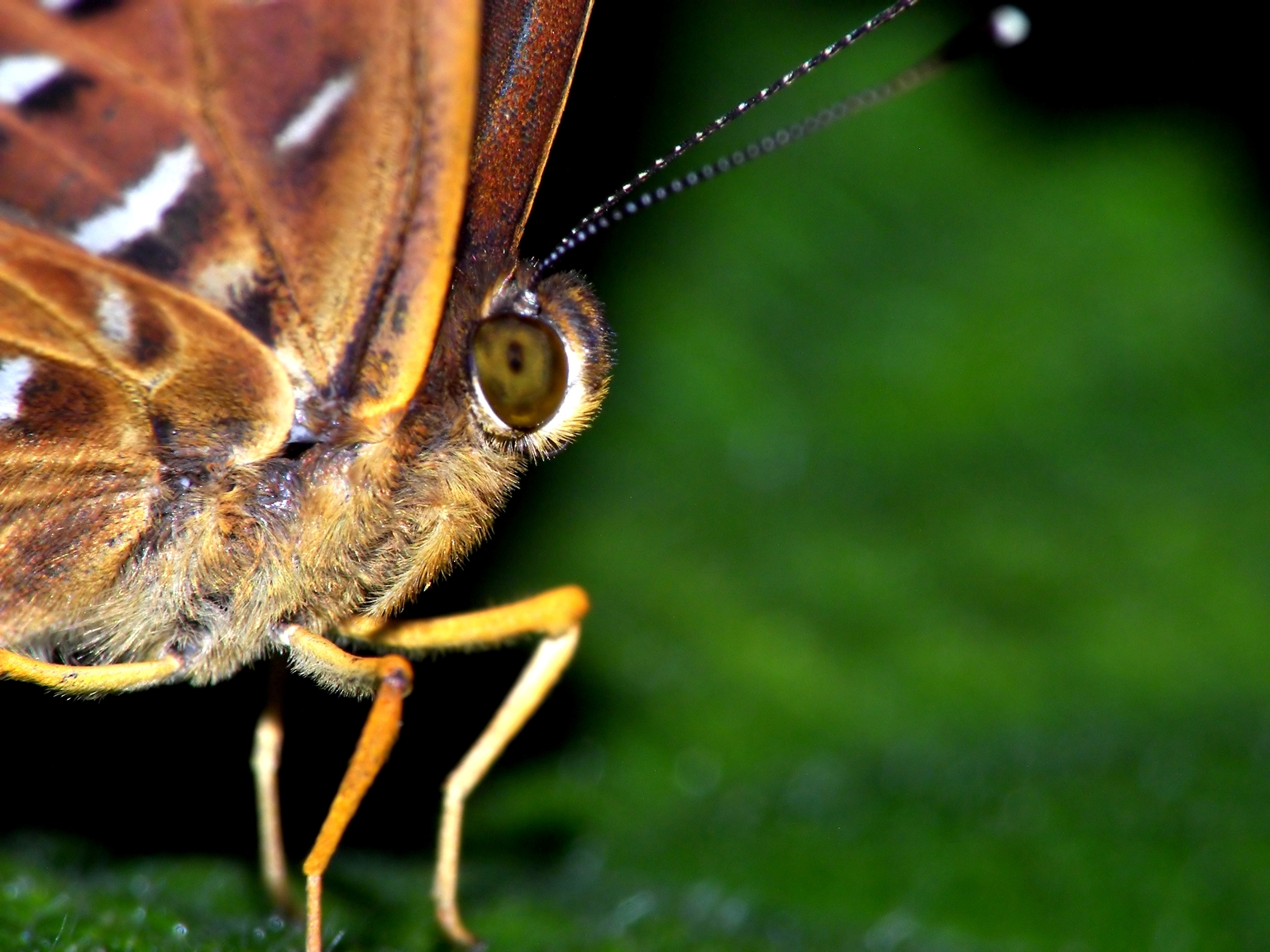 Zemeros flegyas in Hong Kong.